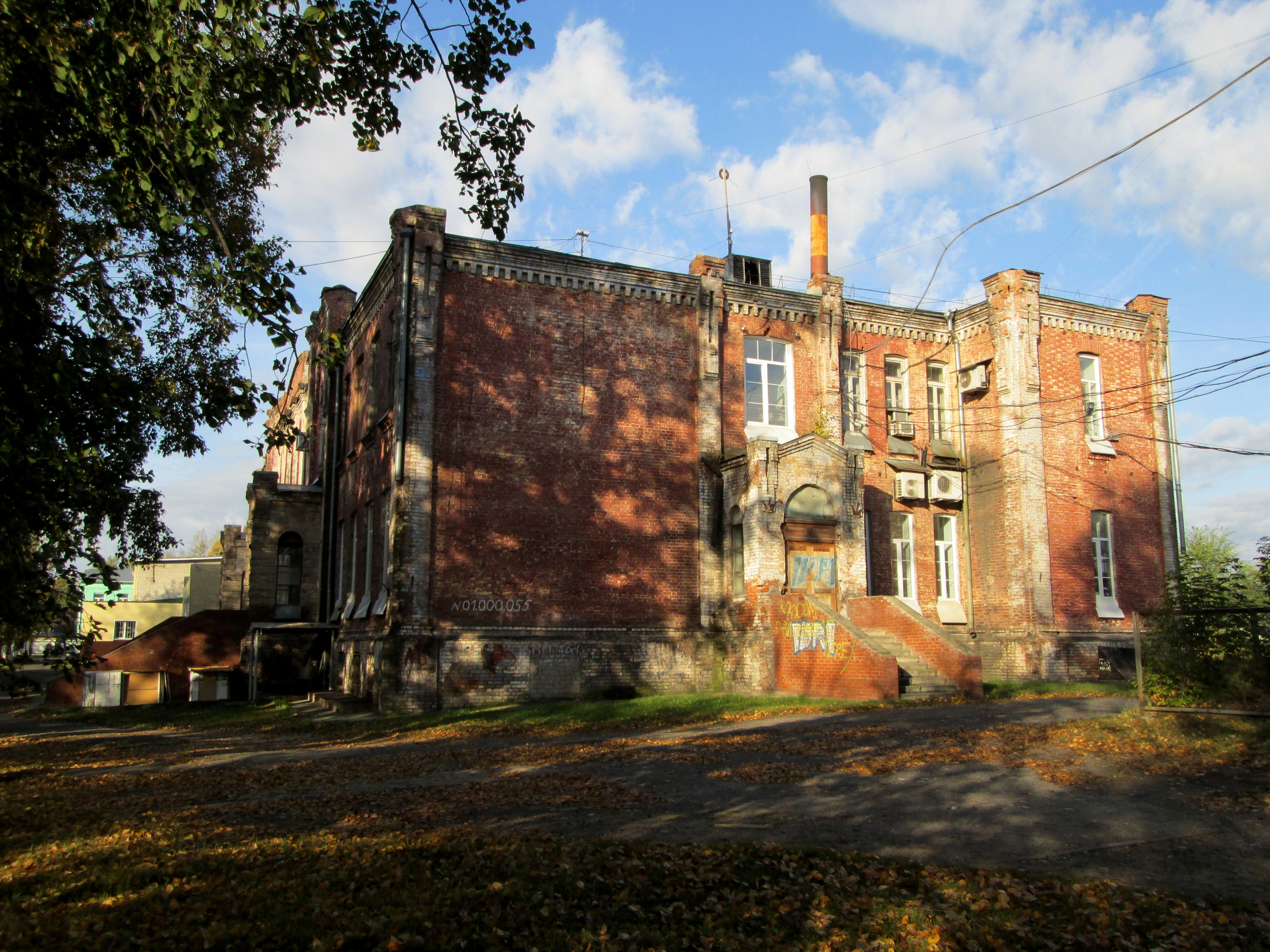 Высшая начальная школа им. Тургенева И. С.: улица Аванесова, 132, Барнаул, Алтайский край